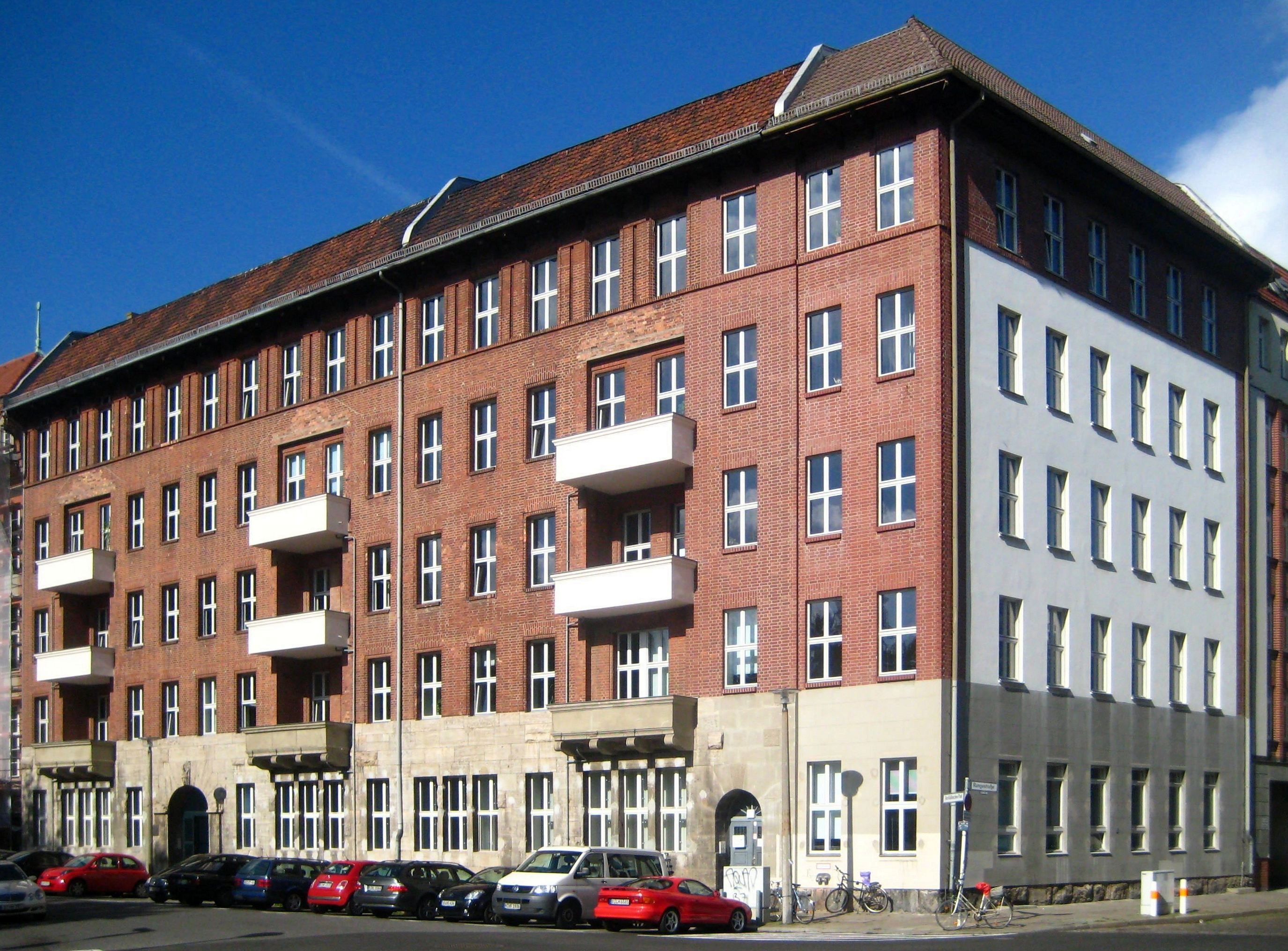 Das ehemalige Gewerkschaftshaus des Deutschen Holzarbeiterverbandes, Am Köllnischen Park 2, Ecke Rungestraße (rechts), in Berlin-Mitte, seit 2009 als "Haus der Psychologie" Sitz des Berufsverbandes Deutscher Psychologinnen und Psychologen sowie zugehöriger Einrichtungen und Gesellschaften. Das fünfgeschossige Gebäude wurde 1914 nach einem Entwurf der Architekten Paul Imberg und Walter Croner errichtet; der bauplastische Schmuck stammt vom Bildhauer Max Jancke. Die Fassade wird durch gleichmäßige Balkonreihen bestimmt. Das Sockelgeschoss ist mit behauenem Sandstein verkleidet; Ziegelsteine verblenden die Obergeschosse. Eine Gedenktafel erinnert an Theodor Leipart, von 1908 bis 1919 Vorsitzender des Deutschen Holzarbeiterverbandes war. Das Gewerkschaftshaus wurde 1933 von der Deutschen Arbeitsfront übernommen; in der DDR-Zeit gehörte es dem FDGB. In der Nachwendezeit residierte hier der Berliner Bezirk der Gewerkschaft Handel, Banken und Versicherungen. Das Haus ist als Teil des Bauensembles Am Köllnischen Park denkmalgeschützt.